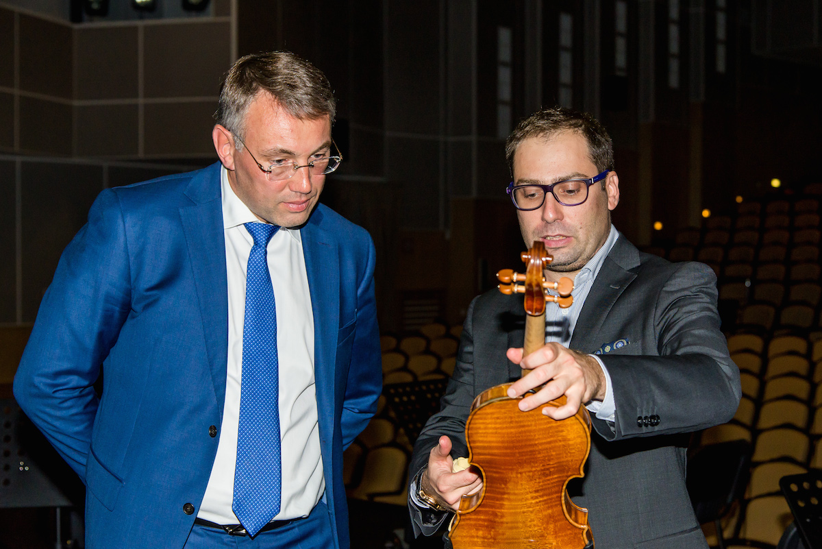 С советником по культуре, скрипачом Дмитрием Коганом на совместном проекте – Арктическом фестивале высокой музыки (проходит в Нарьян-Маре с 2014г).